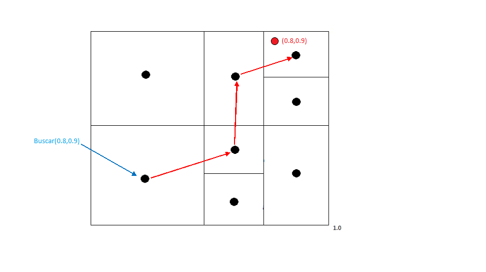 Enrutamiento en CAN